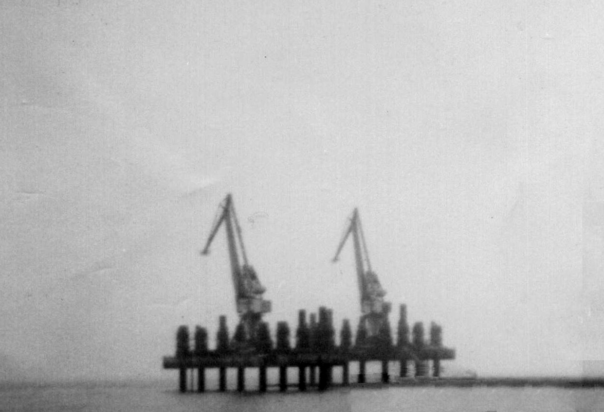 Noordpier bij Noordzeekanaal - verlenging van de pieren